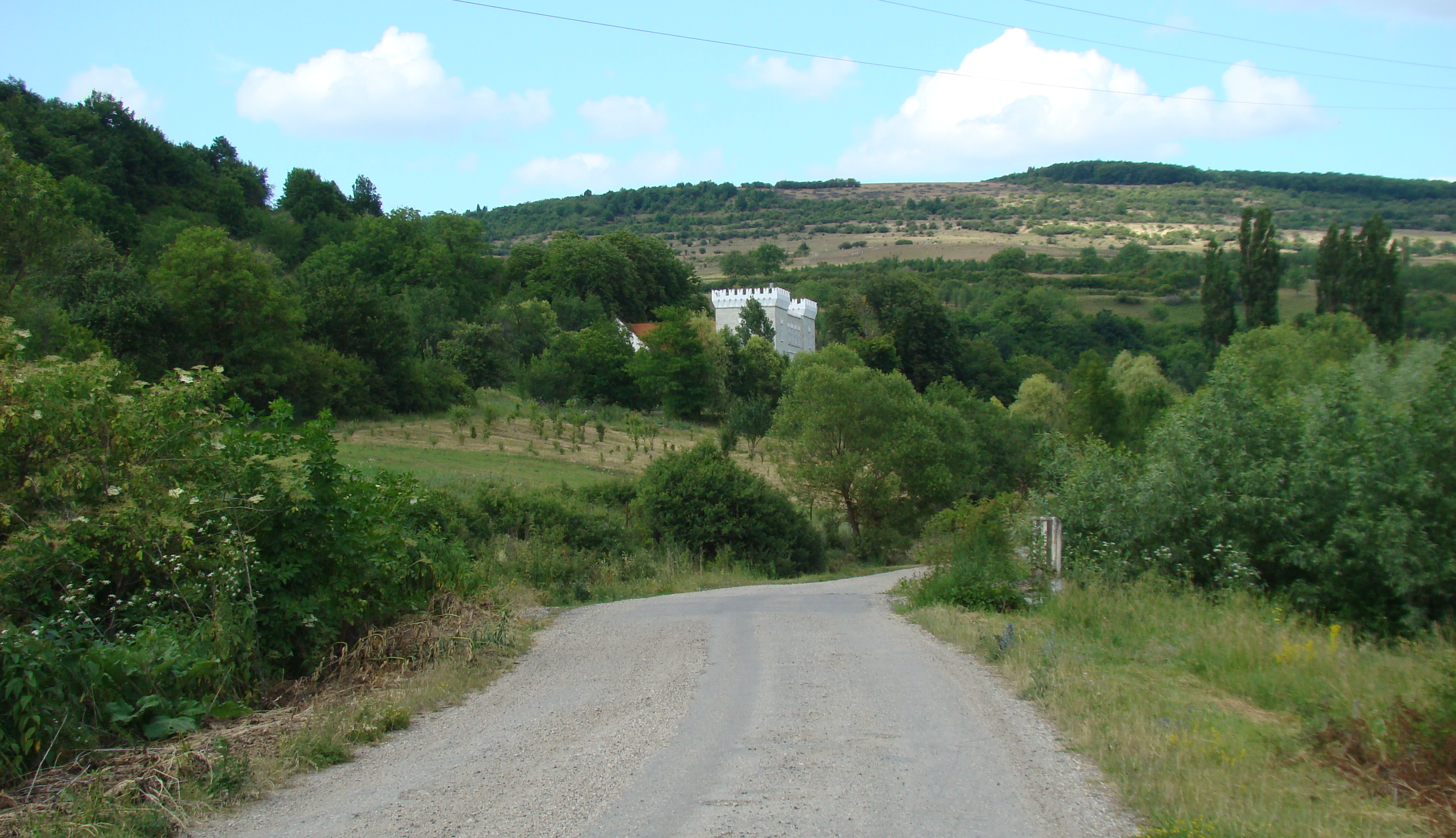 Conacul Schirling din satul Corneni, comuna Aluniș, județul Cluj